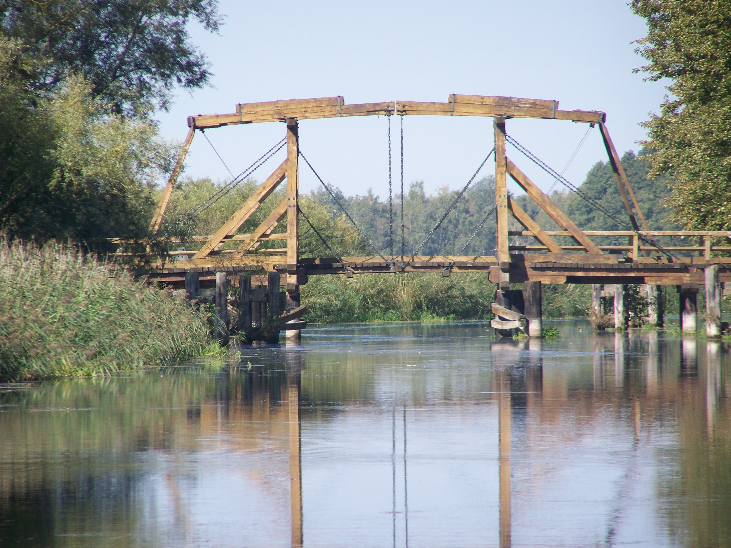 Nehringen,_Klappbrücke_über_die_Trebel_(2009-09-20)